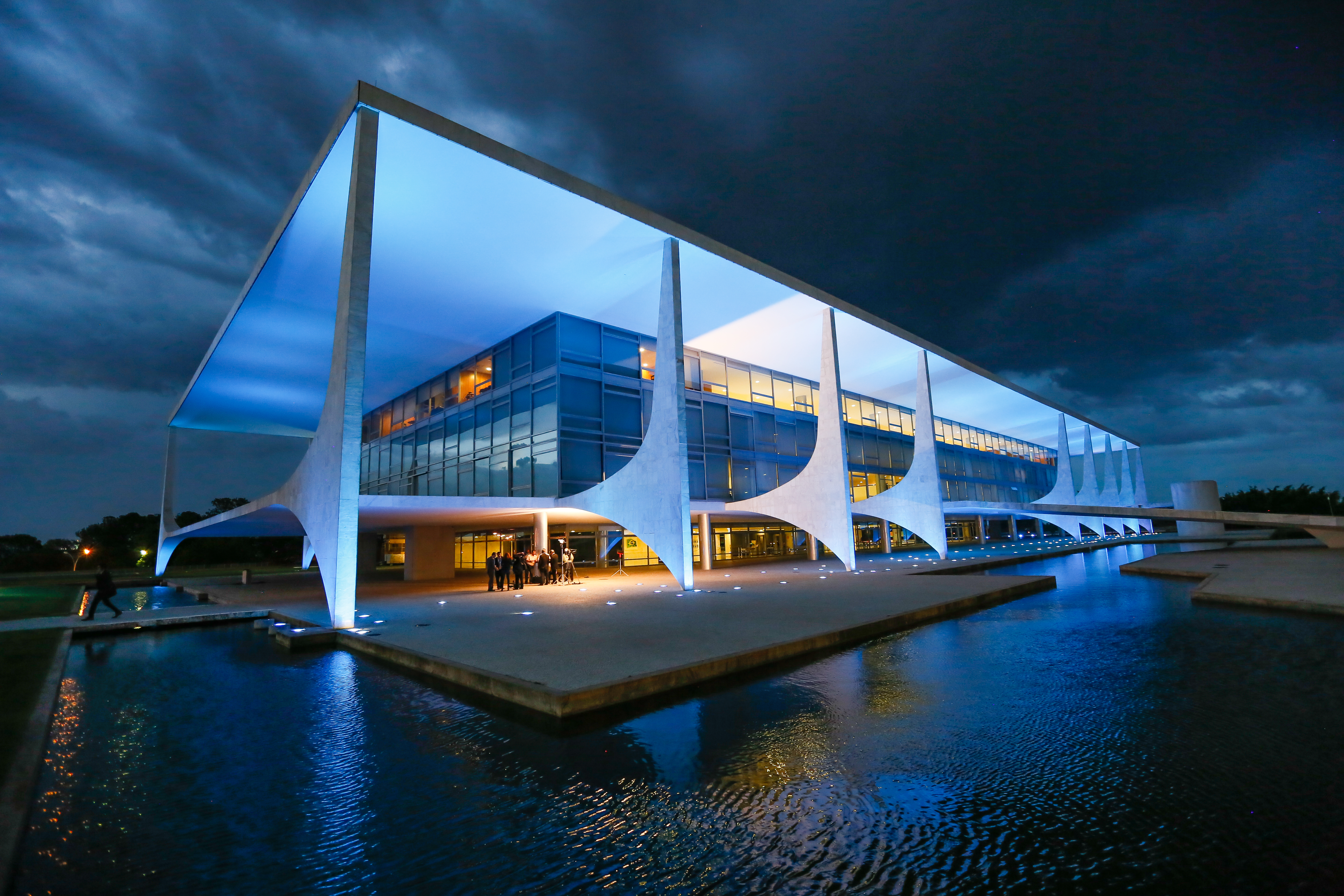 06-11-2014 Novembro Azul Foto: Anderson Riedel